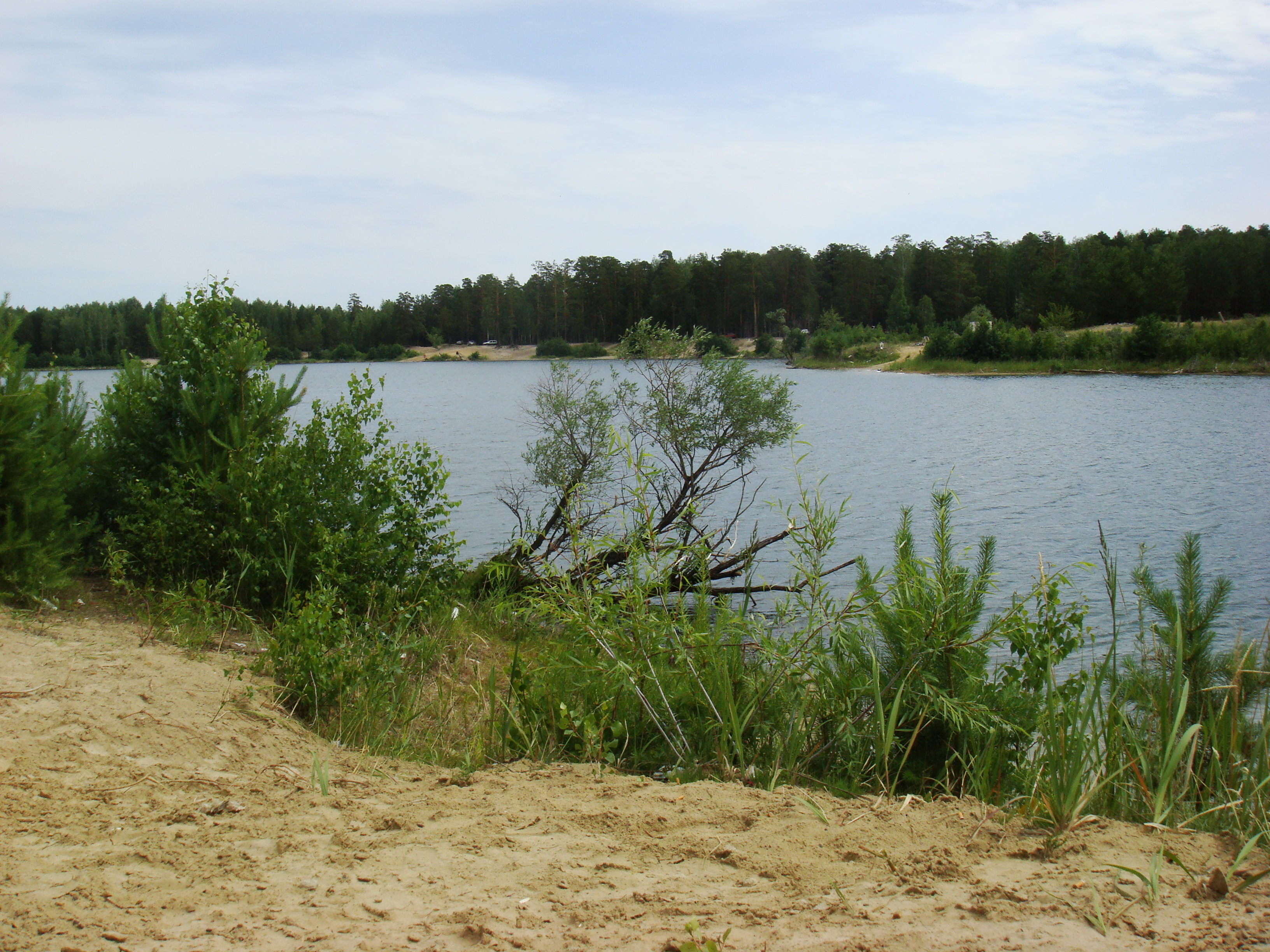 Голубые озера